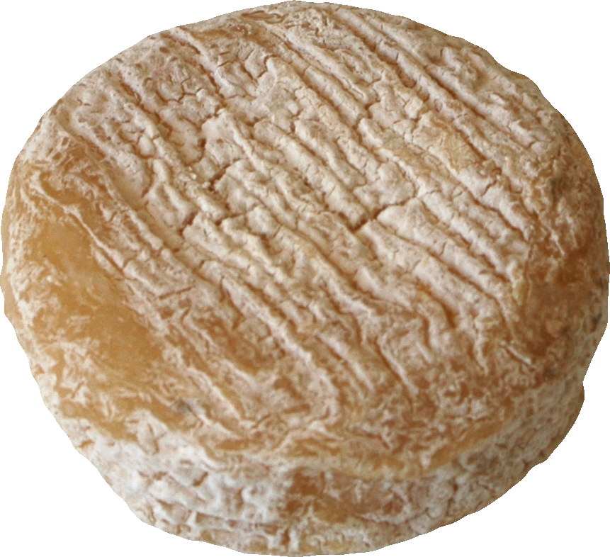 Picodon cheese